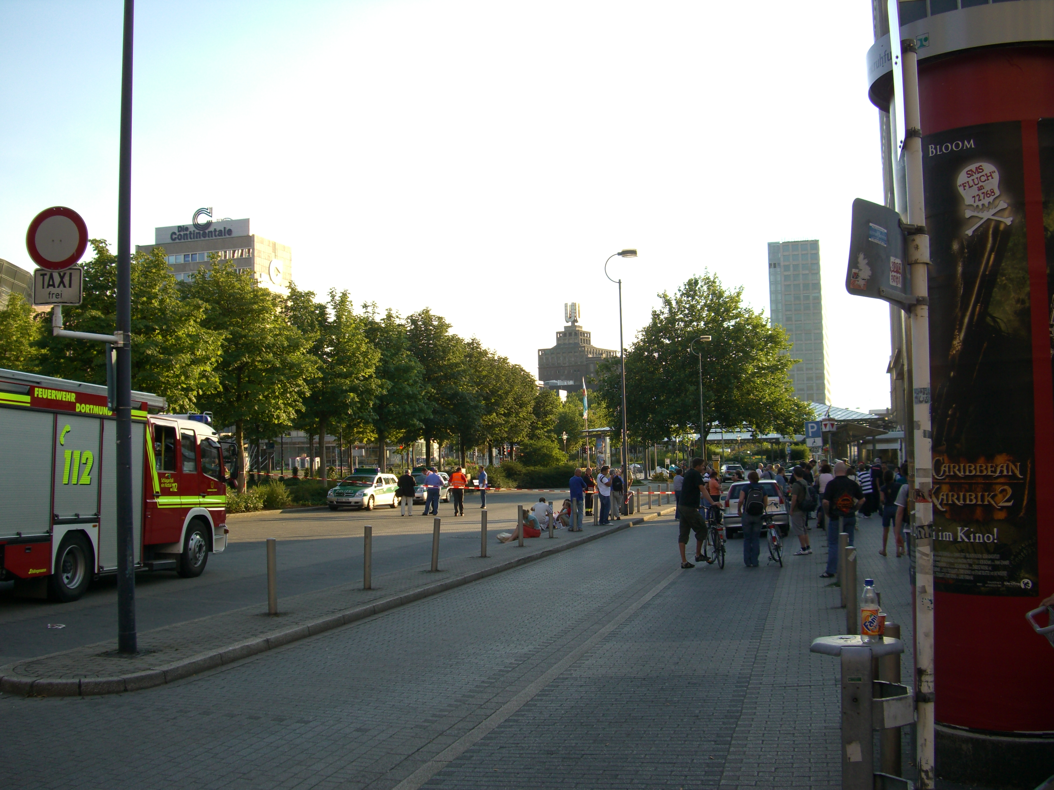 Versuchte Bombenanschläge vom 31. Juli 2006 (Foto zeigt den Dortmunder Hauptbahnhof während der Sperrung)